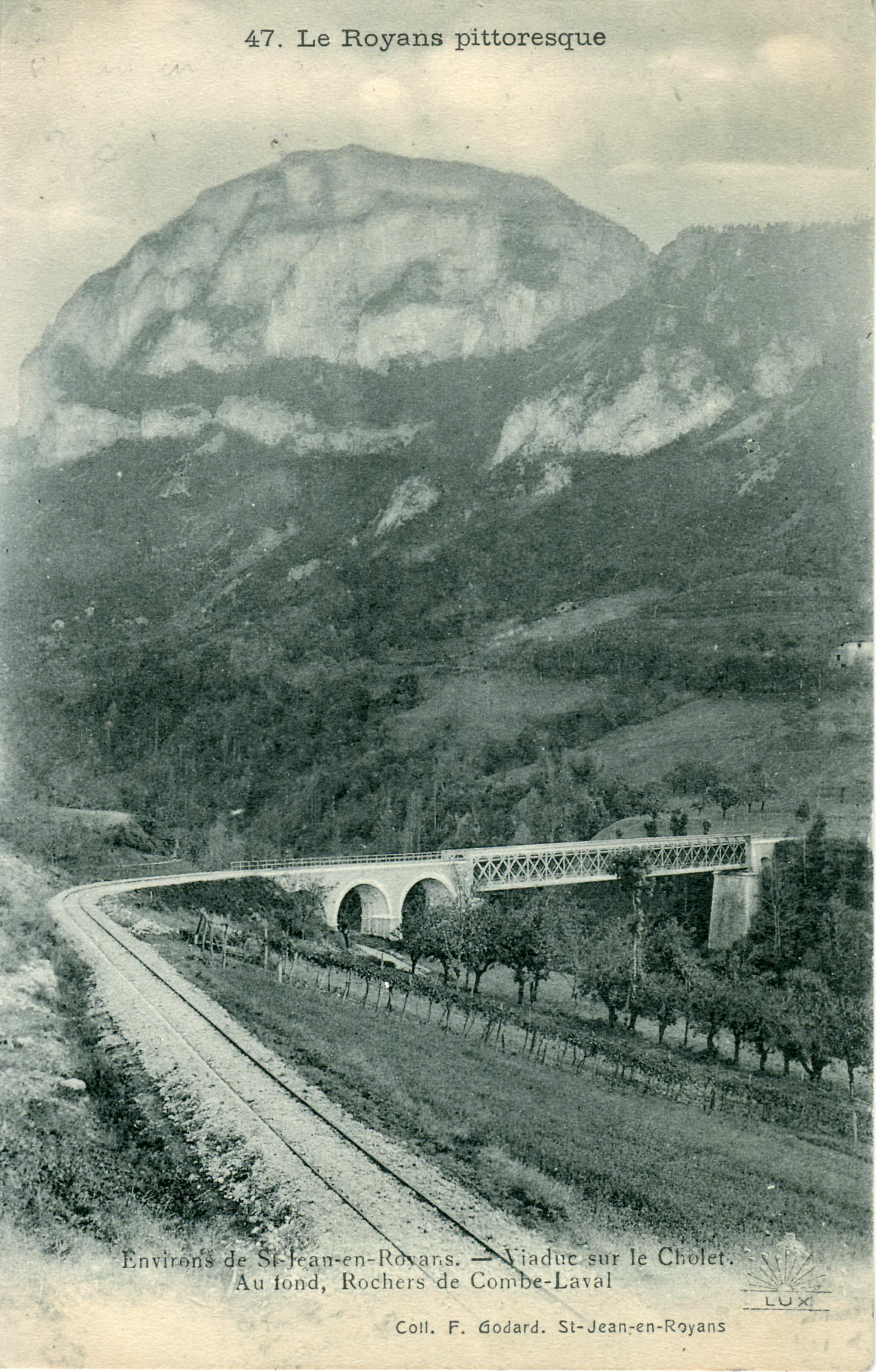 Carte postale ancienne éditée par F. Godard à St-Jean en Royans, collection Le Royans pittoresque, n°47 : Environs de Saint-Jean-en-Royans - Viaduc sur le Cholet. Au fond, Rocher de Combe-Laval